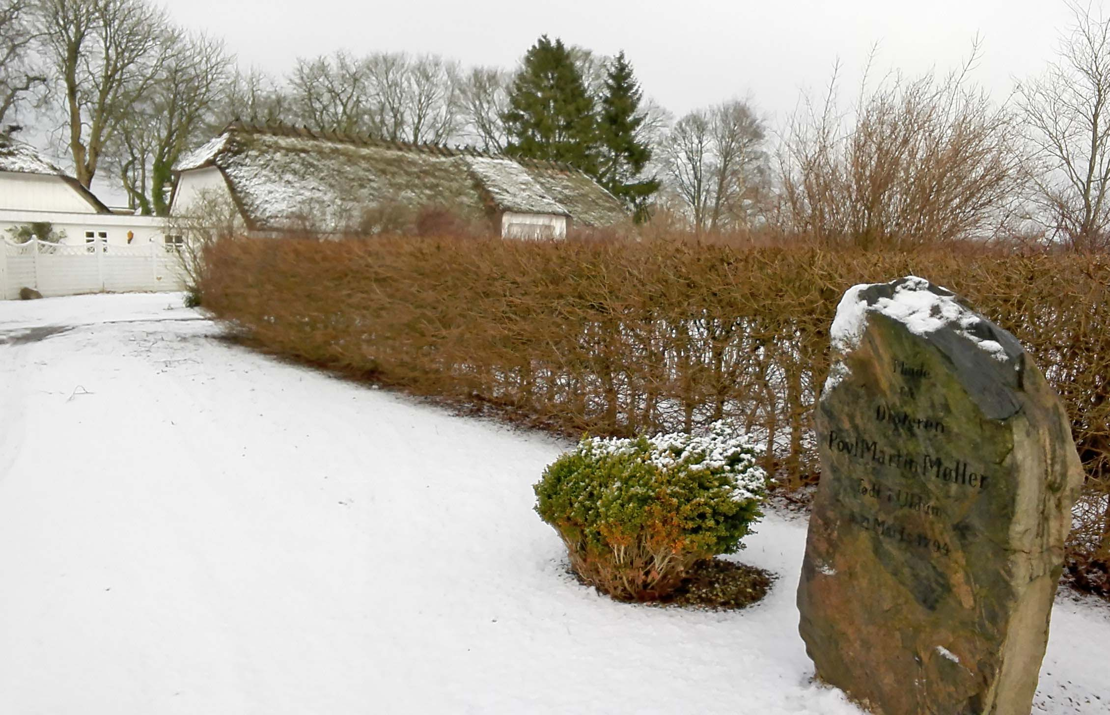 Mindesten for Poul Martin Møller ved Uldum præstegård